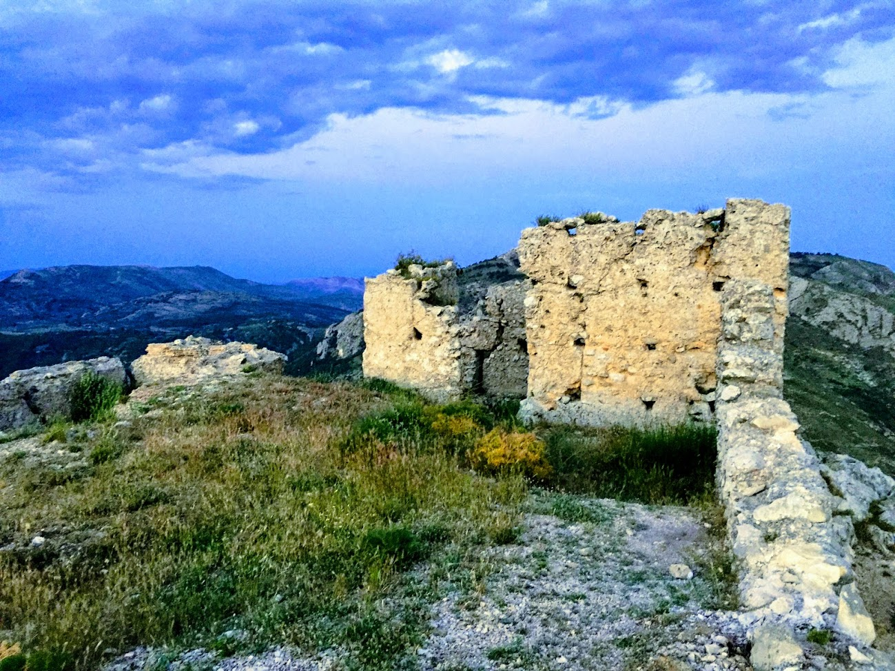 Torre en ruinas del Castillo de Serrella